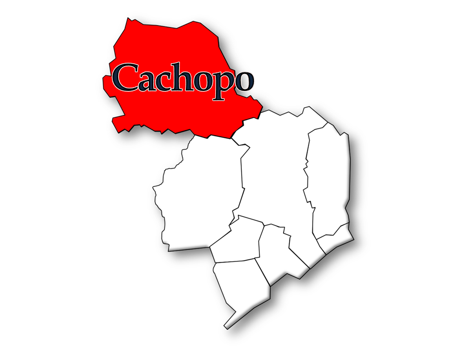 Censos 1864/2011